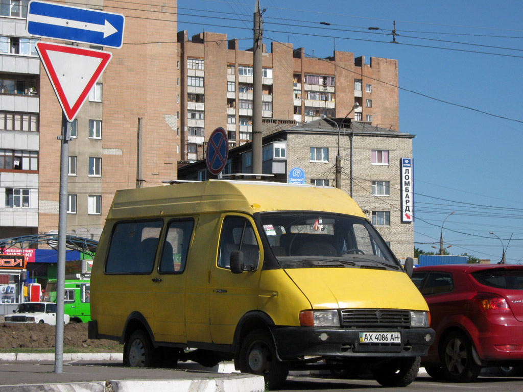 Микроавтобус середины 90-ых гг.выпуска в Харькове